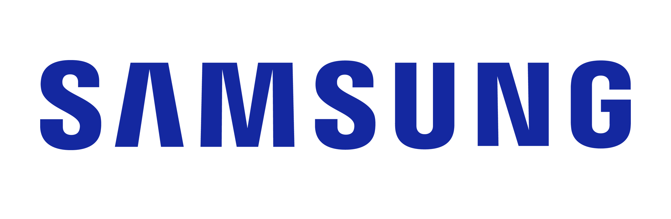 Logo samsung bleu